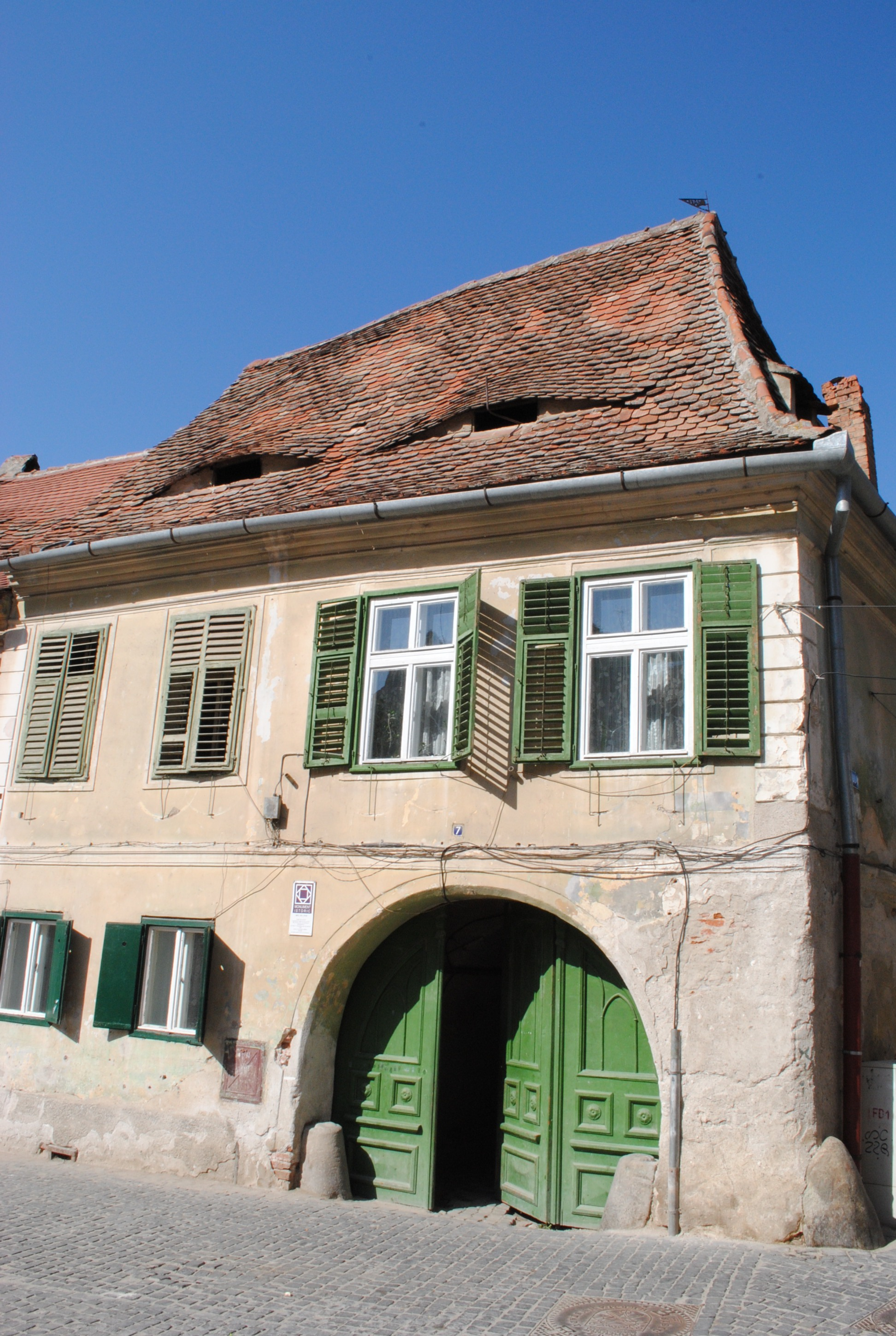 Casă, a doua jum. a sec. XV,1743